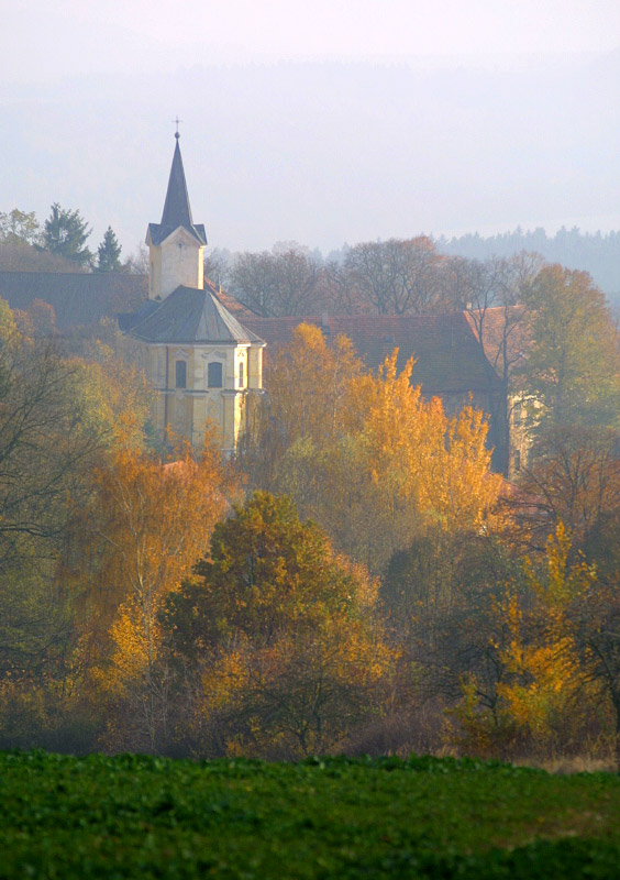 Barokní kostel sv. Jana Nepomuckého ve Chříči.